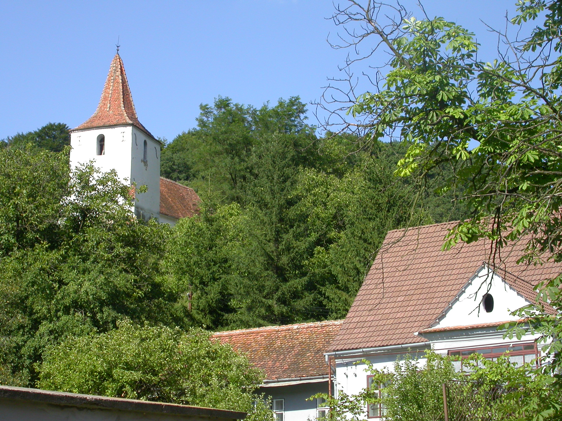 Ansamblul bisericii evanghelice, sec. XIV - prima jum. asec. XIX